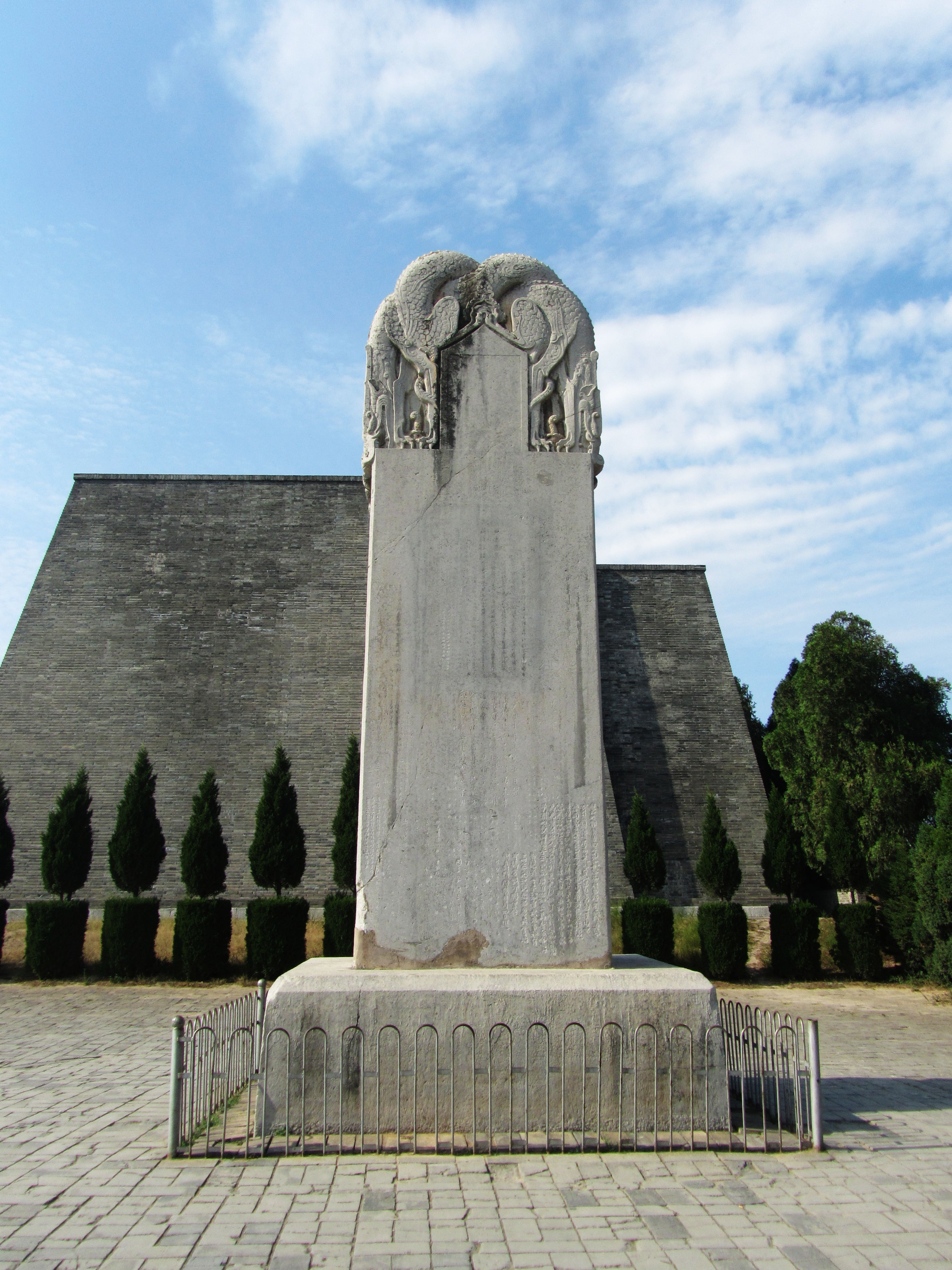 乾陵无字碑，南面，背景为第三道门阙东侧阙台。